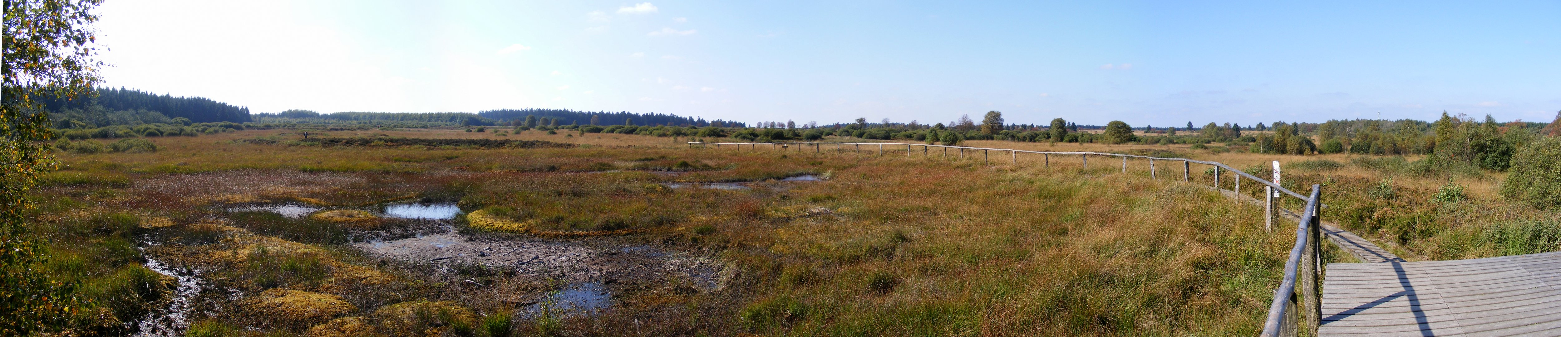 Panorama Hohes Venn, Teilbereich Brackvenn, Belgien im Herbst 2009